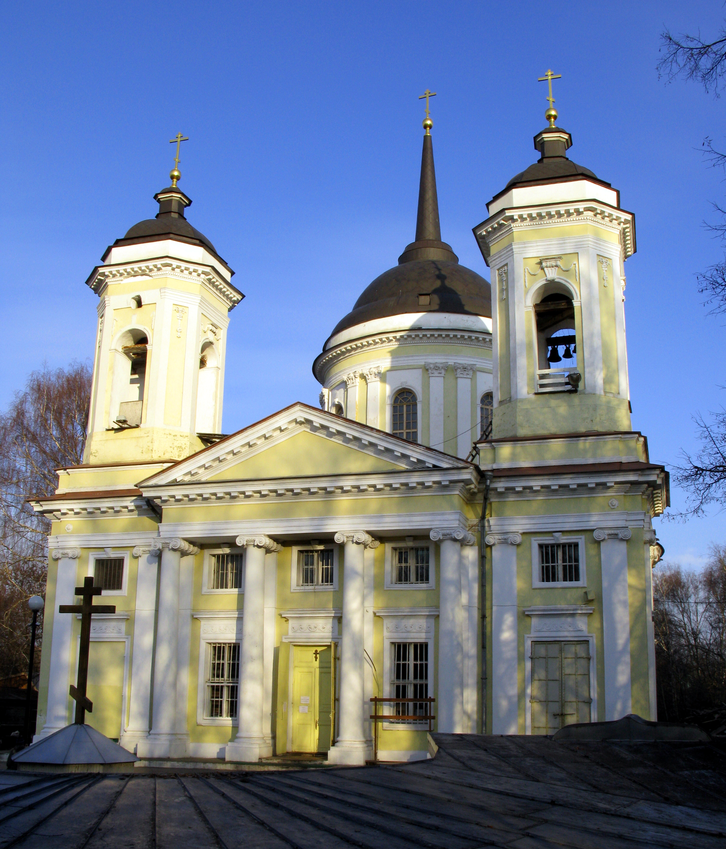 Храм Преображения Господня в Пехре-Яковлевском (Балашиха)